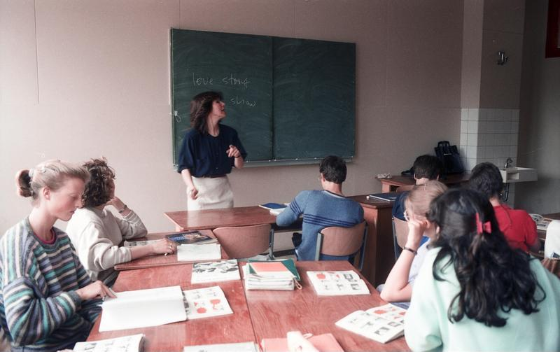 Juni 1988 Bonn, Englisch Unterricht in einem Gymnasium